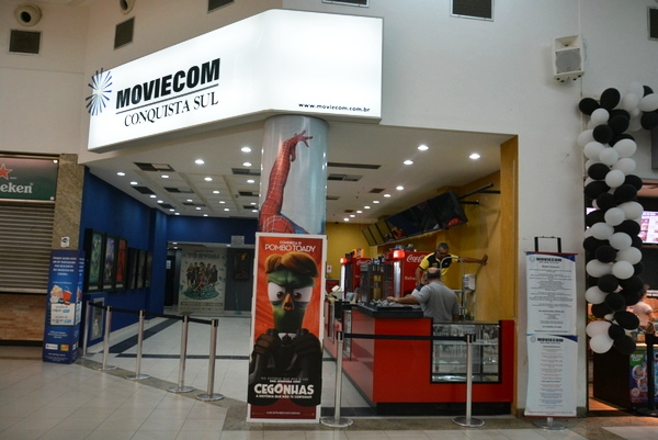 Frente do Moviecom Conquista Sul de Vitória da Conquista